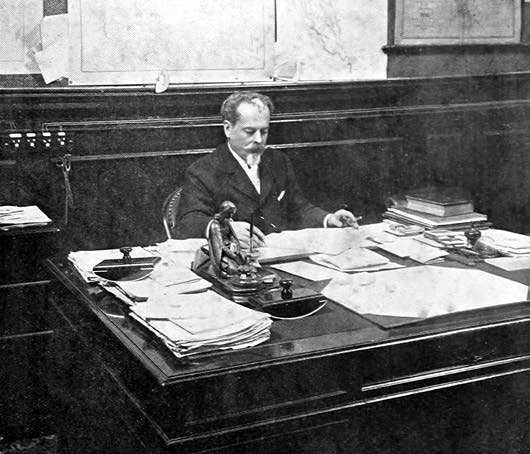 El presidente peruano Nicolás de Piérola en su despacho presidencial, durante su gobierno constitucional del 1895-1899.